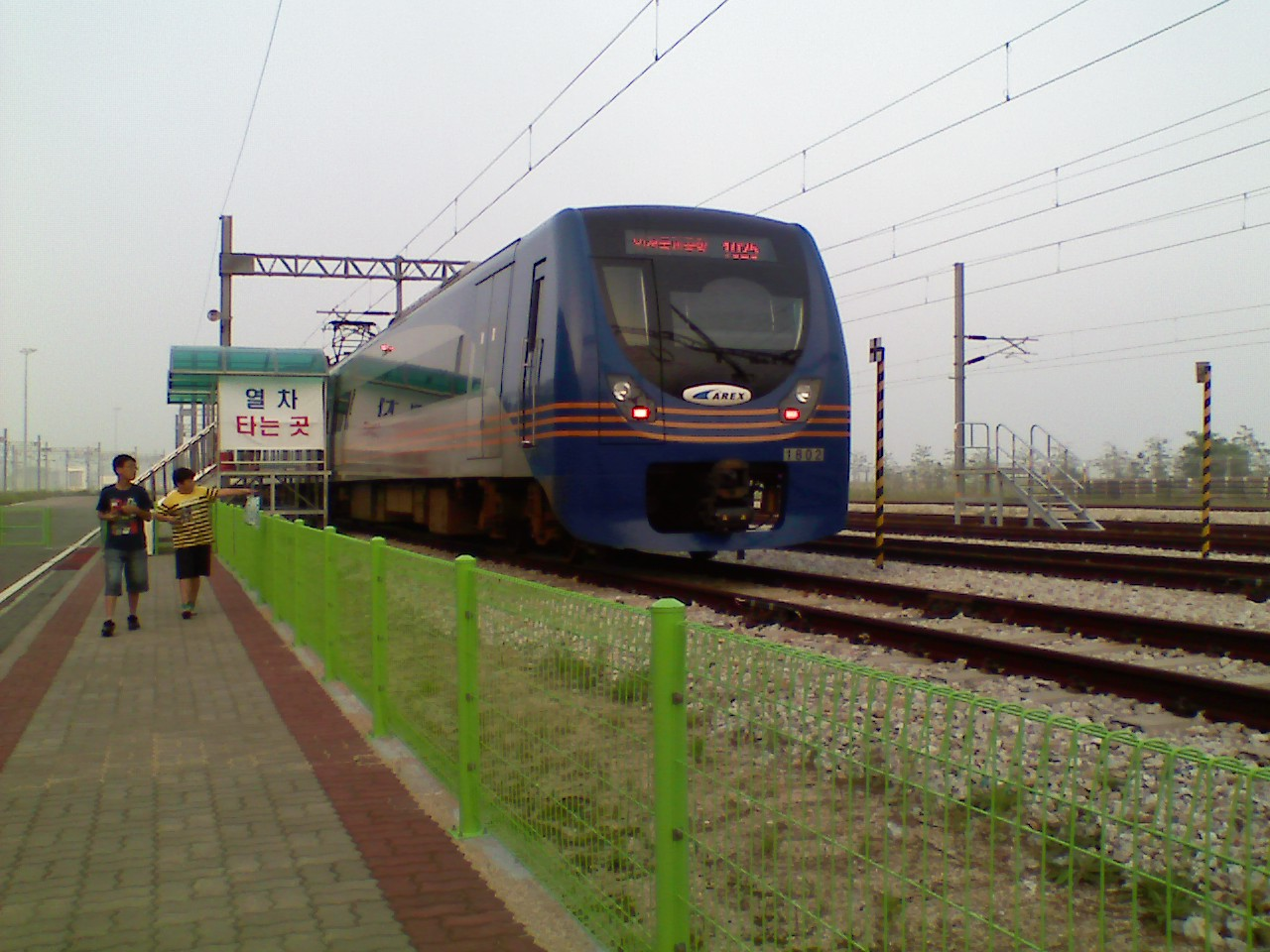 2009년 8월 13일 용유기지 내 임시역에 정차해 있는 공항철도 102편성